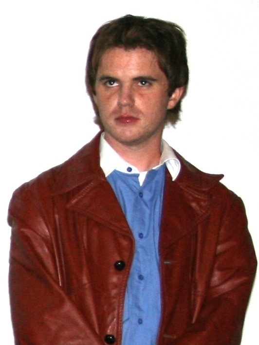 Sean Stewart à l'avant-première de Dorothy diffusée à l'UGC Ciné Cité Bercy, à Paris.